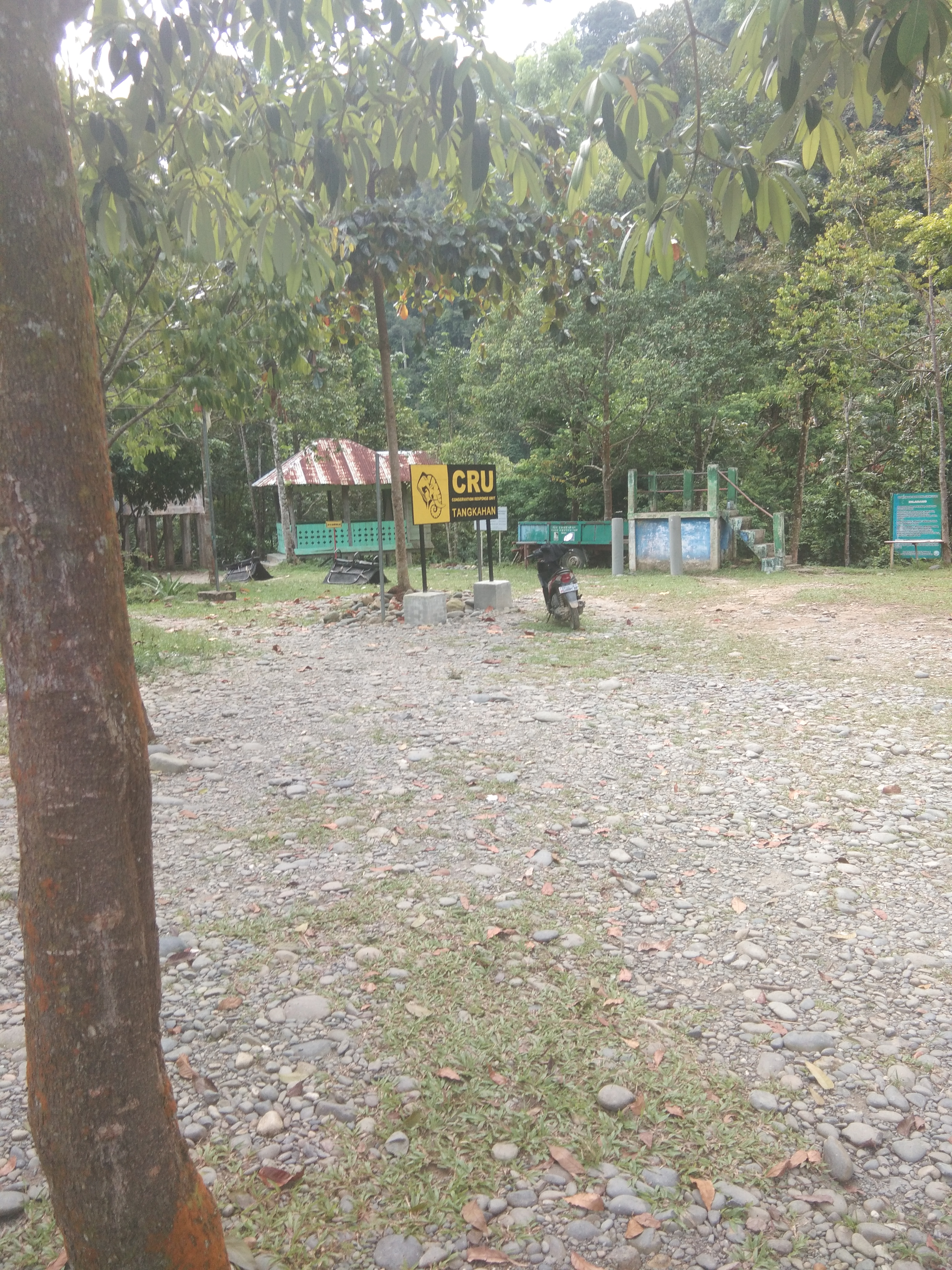 Tangkahan CRU, merupakan pusat konservasi gajah sumatera di Kecamatan batang serangan